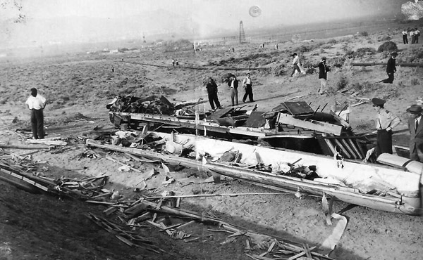 Accidente ocurrido en 1953 en el Ferrocaril de Comodoro Rivadavia, cerca de Rada Tilly (Playa 99), que dejó un saldo de 25 muertos